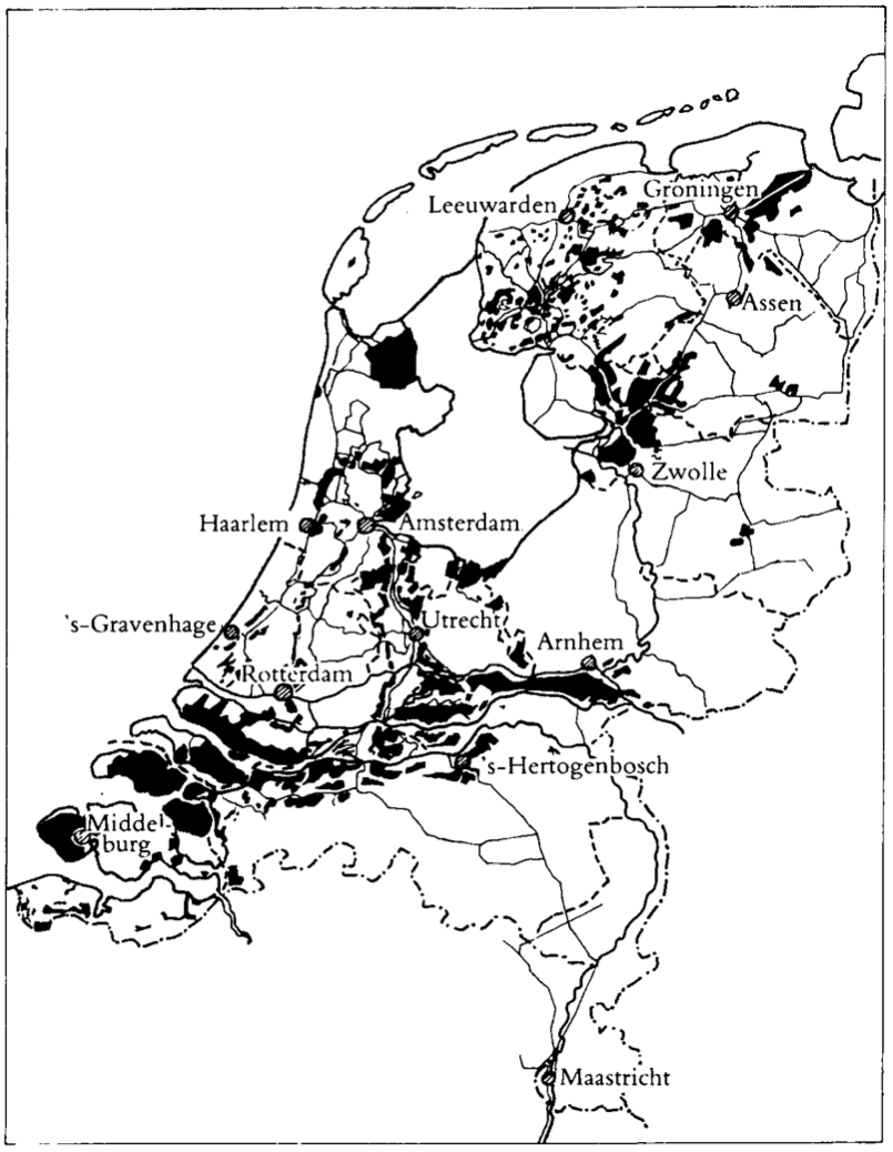 Inundatiegebieden ten tijde van de bevrijding De Wieringermeer en de gebieden ten noorden en ten zuiden van de stad Utrecht zijn pas in april 1945 onder water gezet.